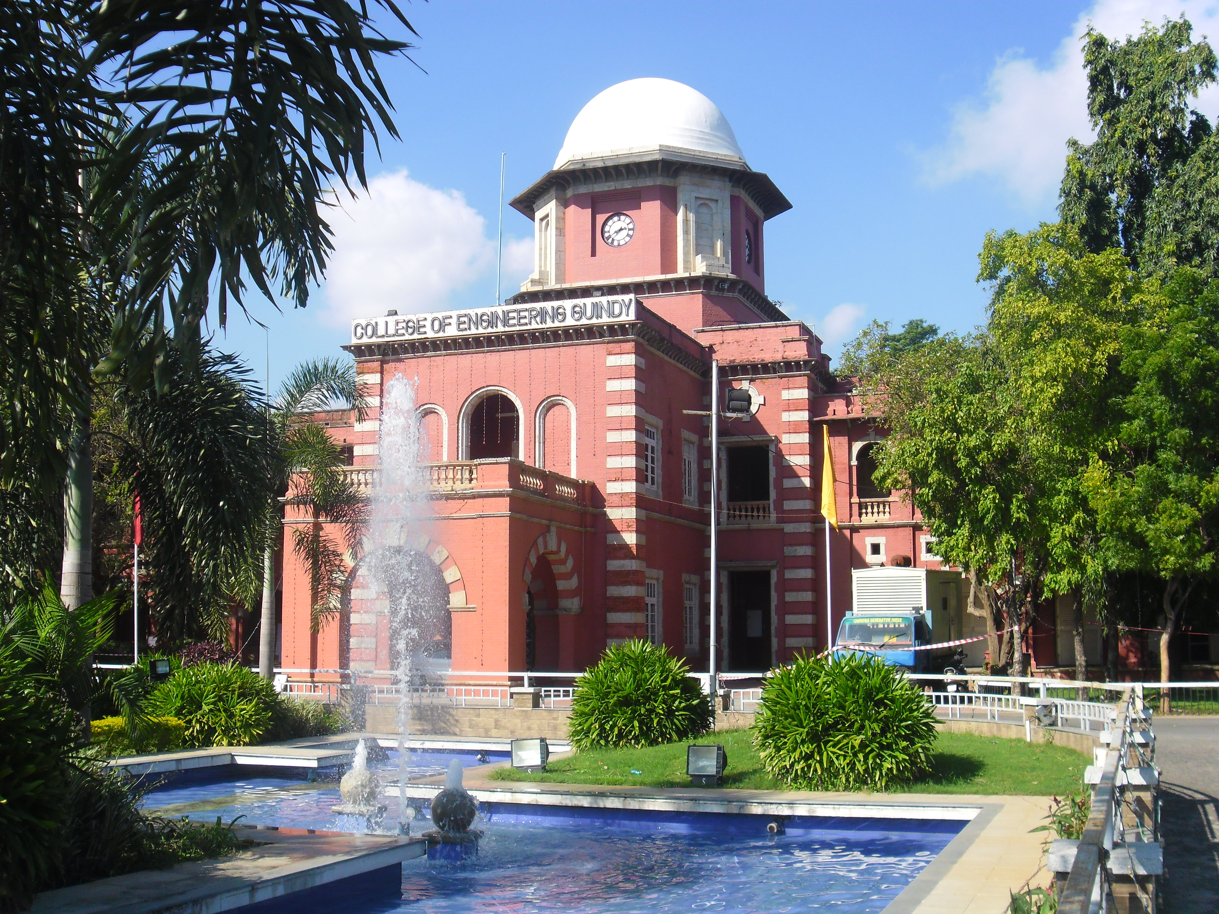 கிண்டி பொறியியற் கல்லூரி